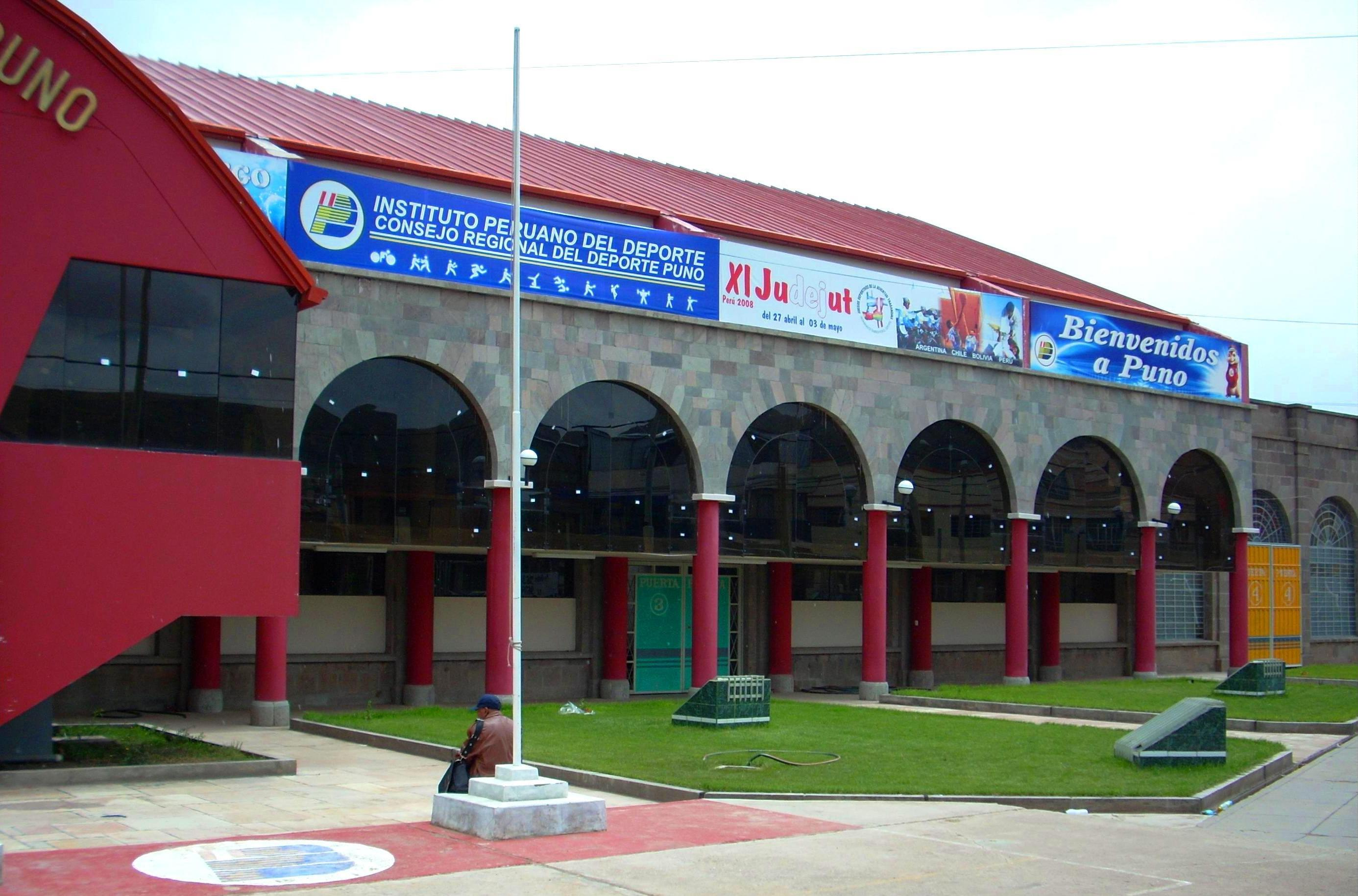 Estadio Enrique Torres Belon De Puno - Frontal